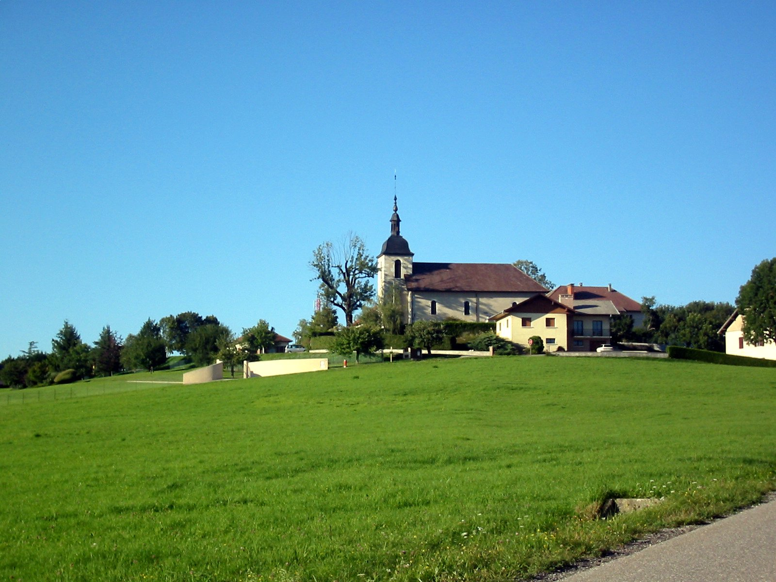 Photos de l'église de Saint Martin Bellevue en Haute-Savoie.